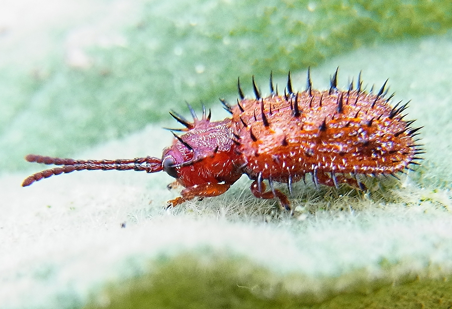 Dicladispa testacea aus Spanien, aus Spanien, am Fluß Ebro bei 50700 Caspe am 6. Juni 2013